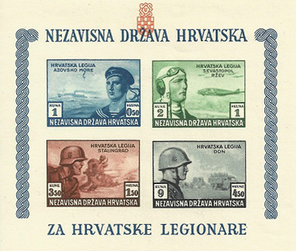 Želimo Vas izvijestiti da Hrvatska pošta nema nikakve ovlasti nad korištenjem slika maraka iz vremena NDH. (Translated: The croatian post does not have any copyright on stamp issues of the NDH). So this stamp is "public domain".